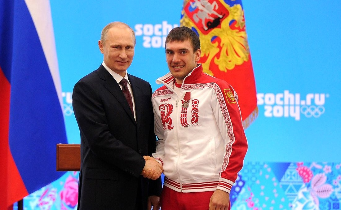 Медалью ордена «За заслуги перед Отечеством» второй степени награждён бронзовый призёр Олимпийских игр в биатлоне Евгений Гараничев.